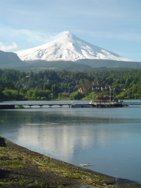 La Poza de Pucón. Vista del Lago y Volcán Villarrica. Foto Personal,tomada con Cámara Sony